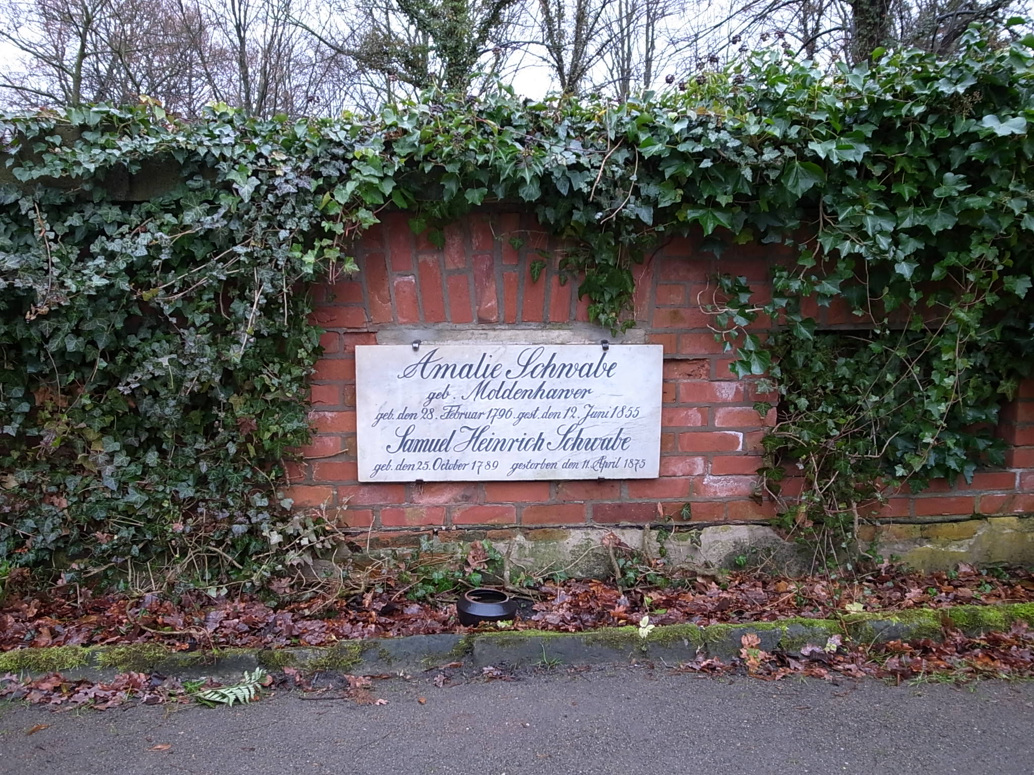 Samuel Heinrich Schwabe, Neuer Begräbnisplatz (Dessau)